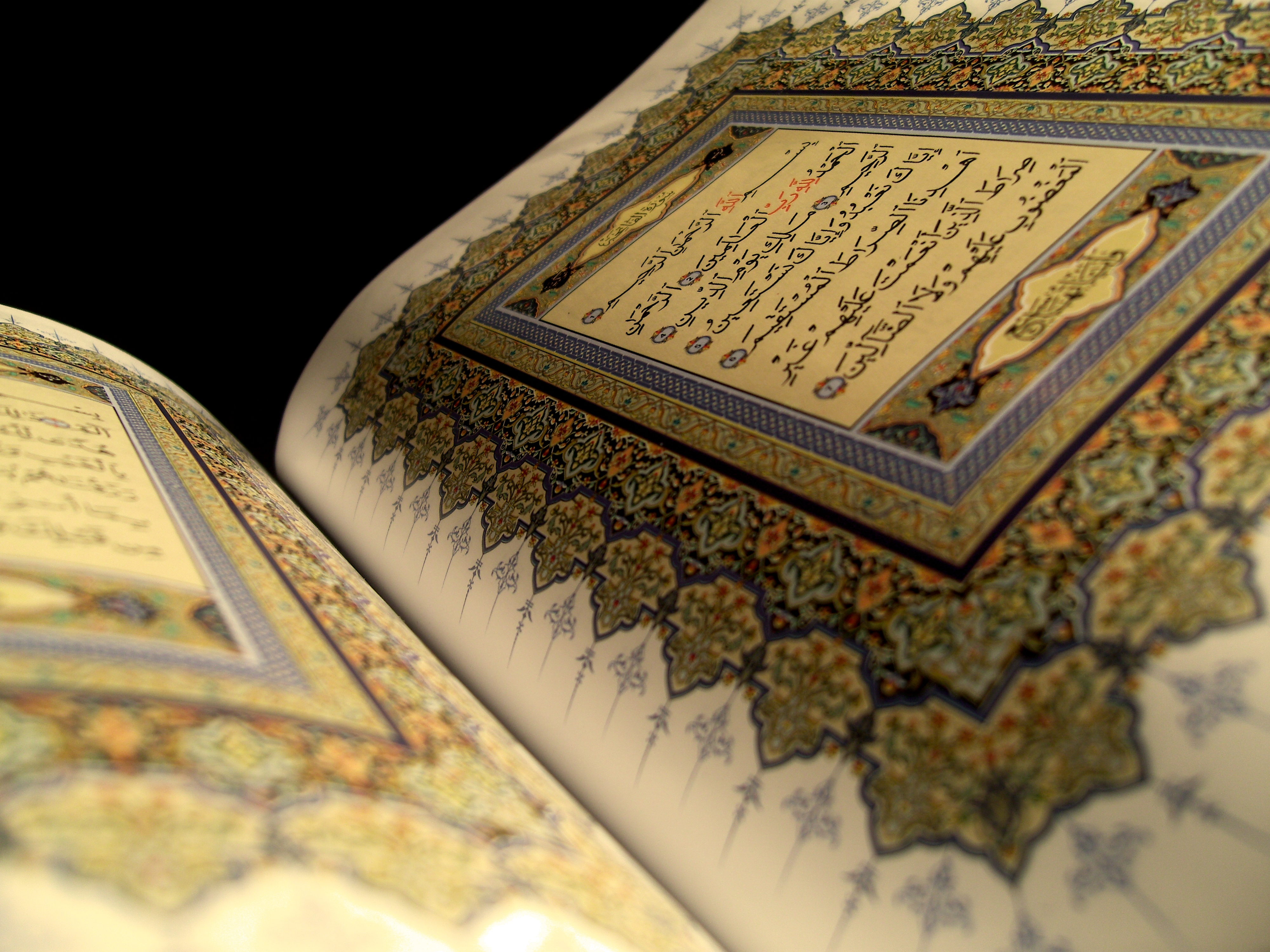 Une copie du Coran montrant la première sourate sur la page de droite.